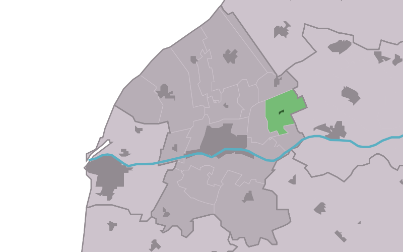 Kaartsje fan himrik fan Peins